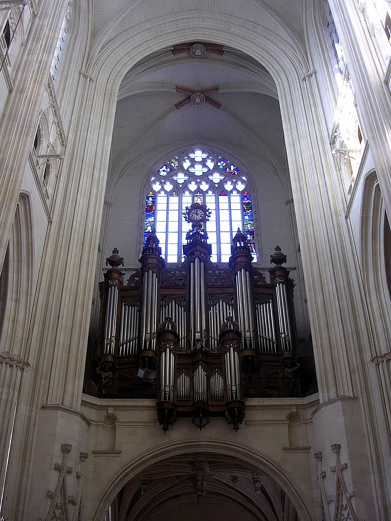 Grand Orgue de la cathédrale de Nantes - 2020.